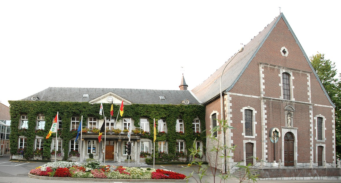 Rathaus mit Klosterkirche der Kapuziner